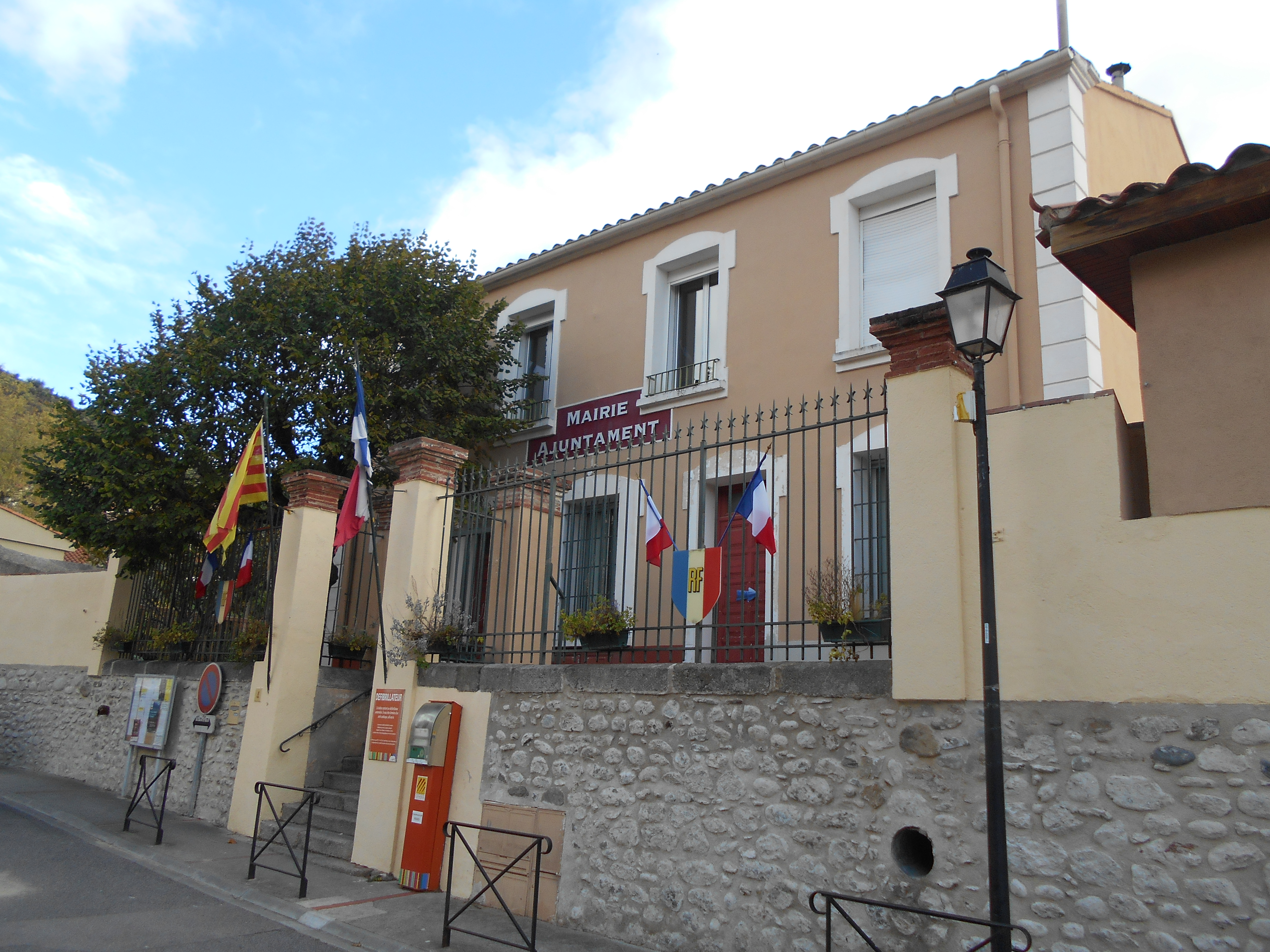 La Casa de la Vila de Rodès